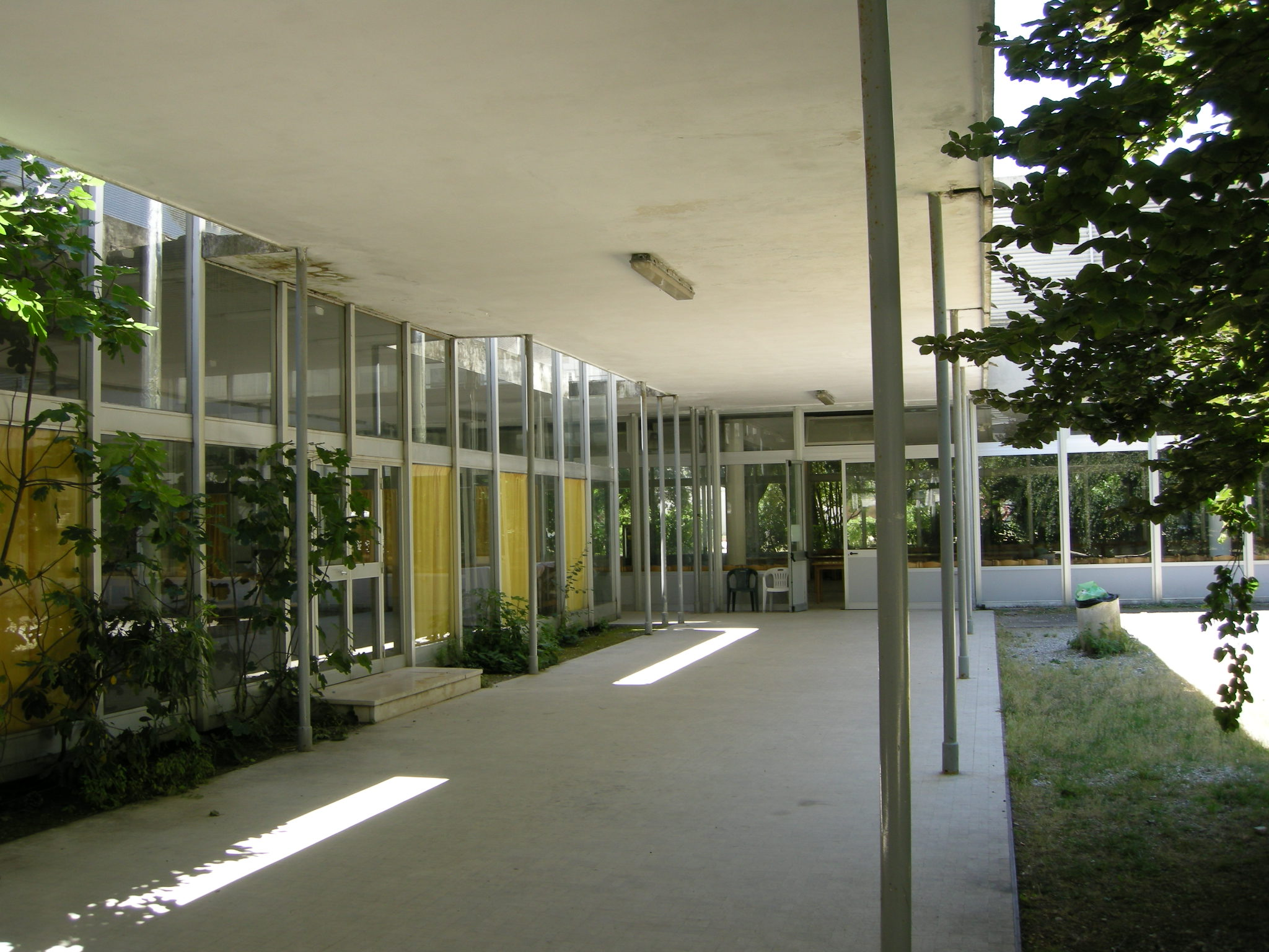 Colonia olivetti